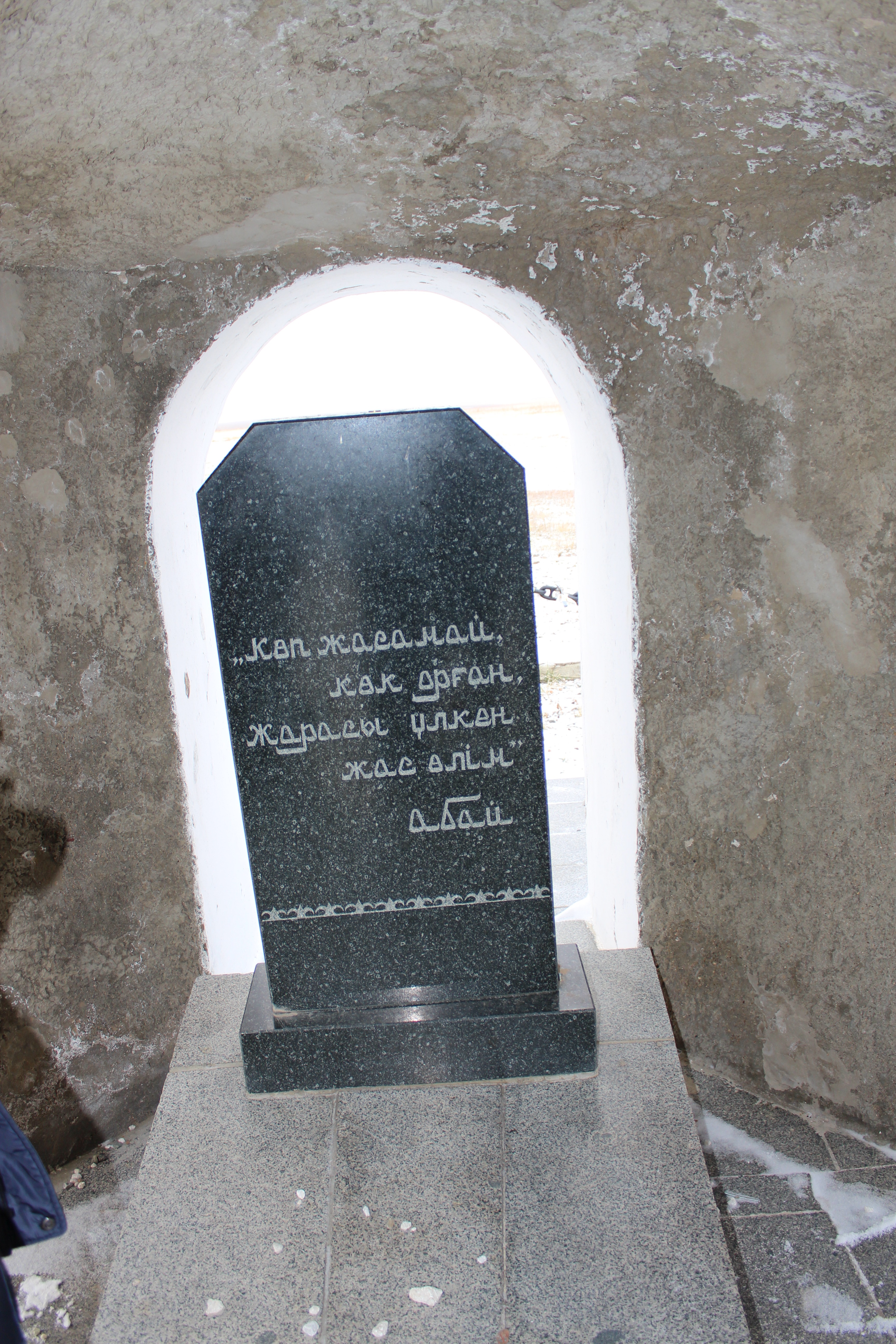 Қазақша (кирил): Еңлік Кебек кесенесінде орнатылған тас